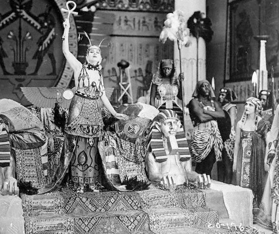 Теда Бара в фильме «Клеопатра»